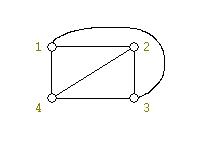 Пример укладки планарного графа